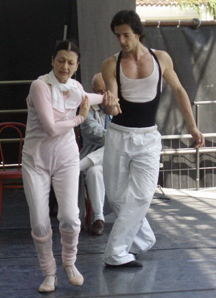 Carla Fracci in prova con Fabio Grossi, in occasione del Premio Acqui Danza conferitole nel 2006.